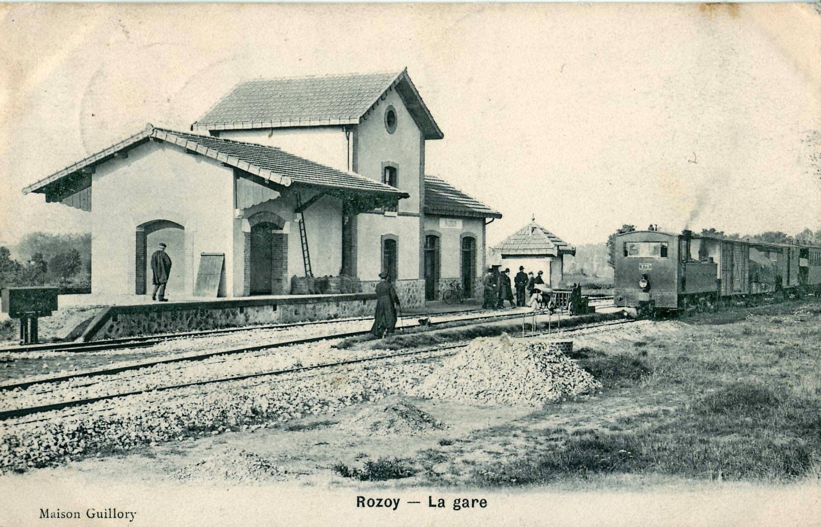 Carte postale ancienne éditée par Maison Guillory : ROZAY - La Gare. Rame tractée par la locomotive 3711 construite par Buffaud & Robatel sur la ligne Jouy-Le-Chatel - Marles-en Brye de la Société générale des chemins de fer économiques du réseau de Seine-et-Marne.